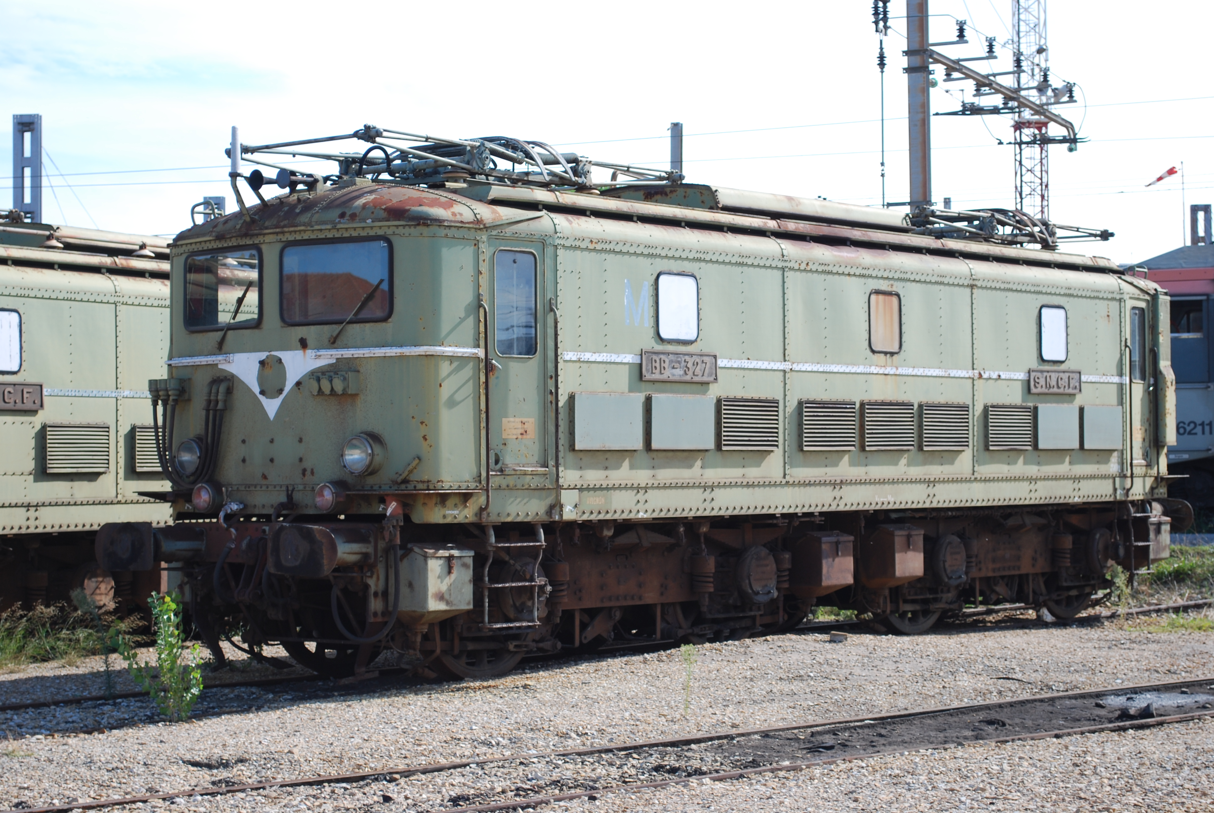 La BB 327 au dépôt de Miramas en 2010